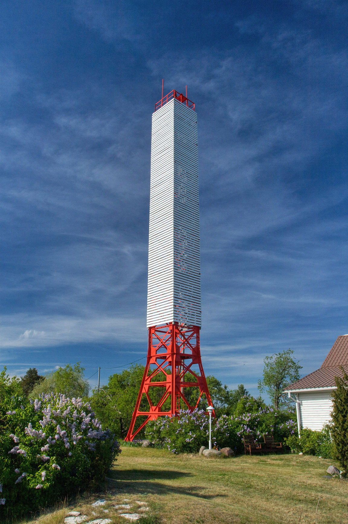 Liu tulepaak